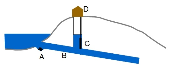 Intake from the reservoir to water tunnel for a hydroelectric power station.